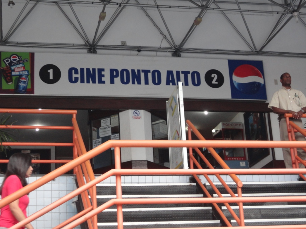 Frente do Orient Cinemas Ponto Alto de Salvador, BA